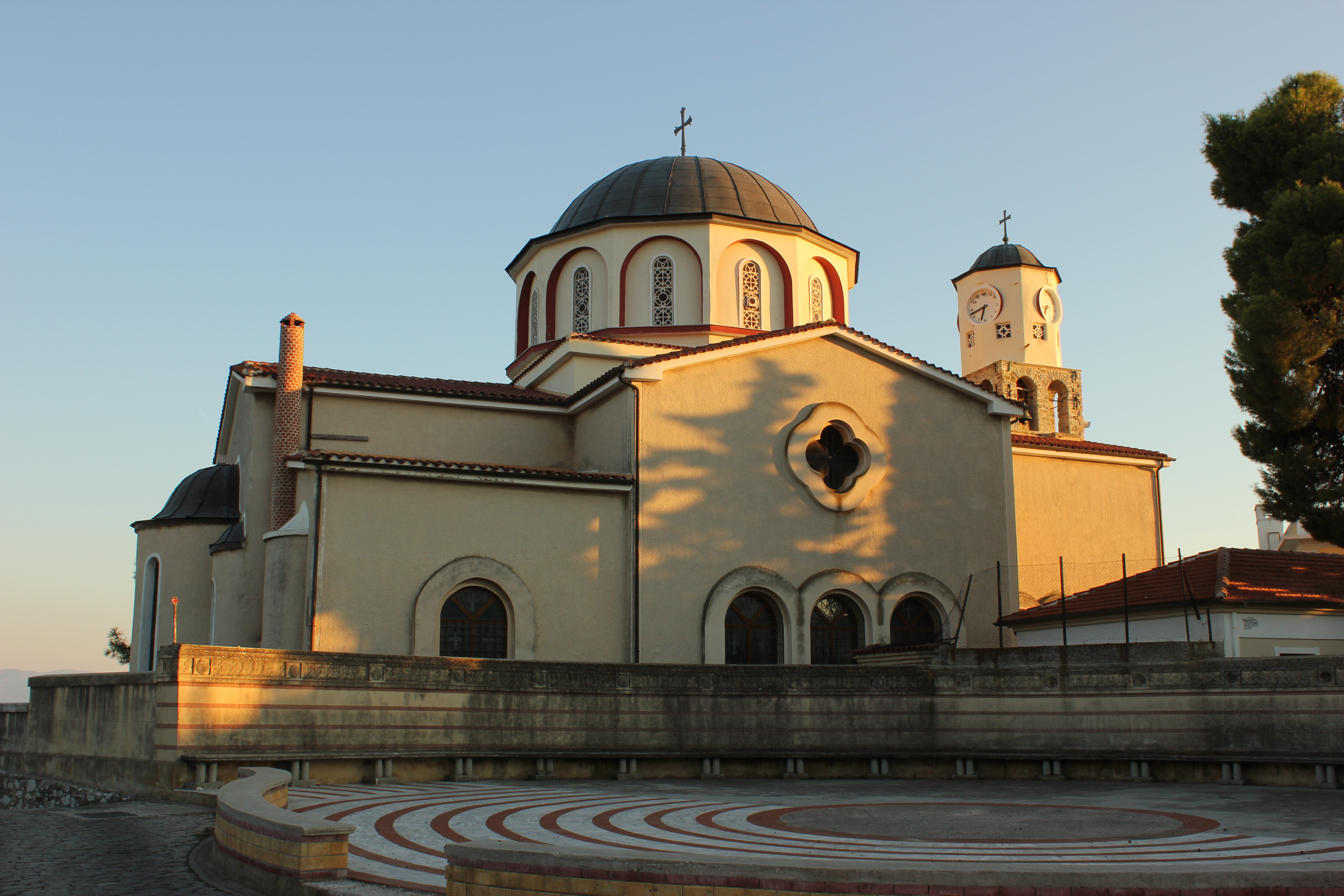 Църква „Успение Богородично“, Кавала